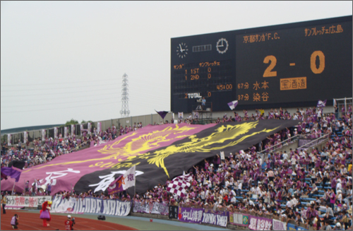 試合後